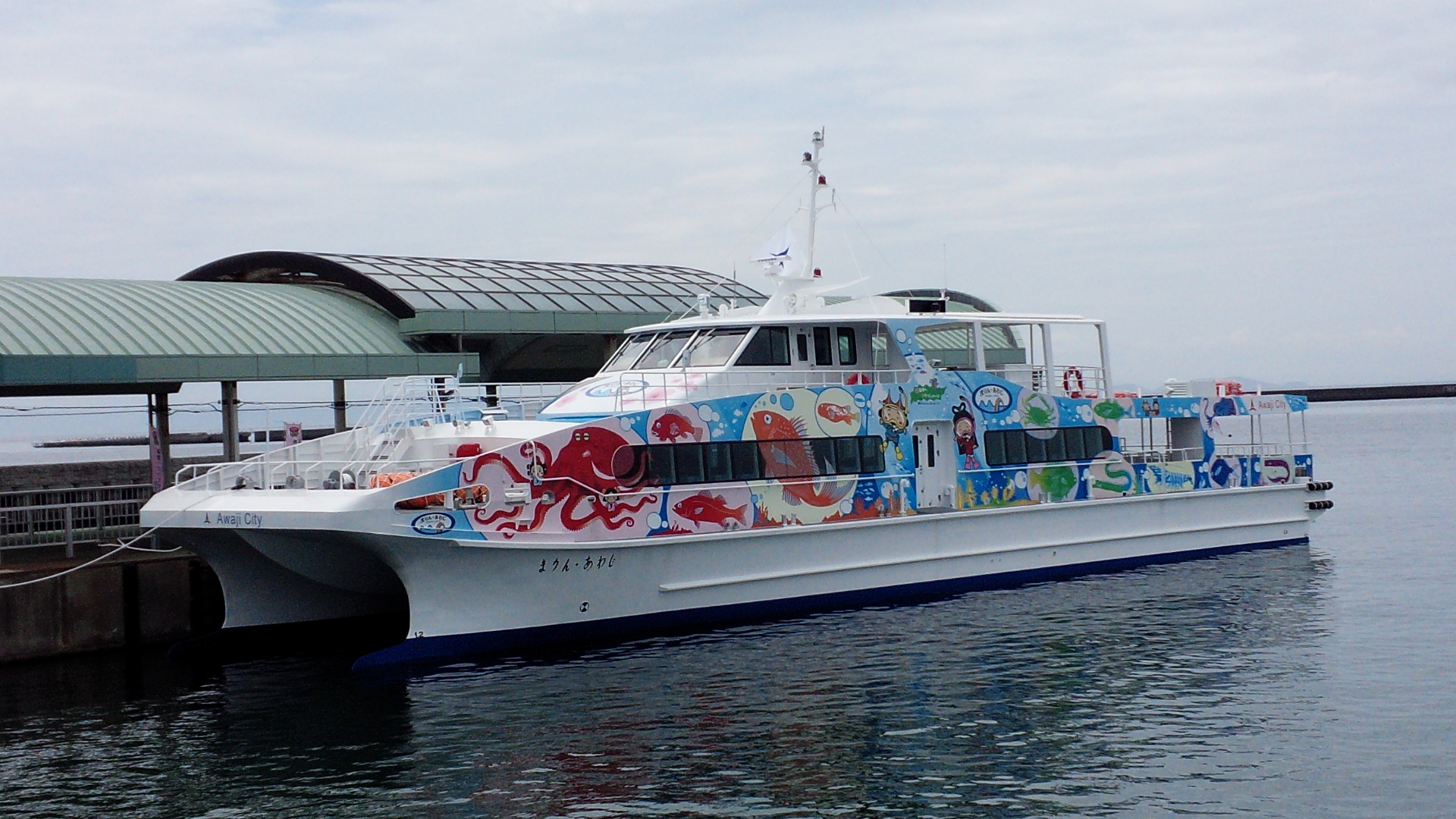 淡路市が所有して淡路ジェノバラインで就航する「まりん・あわじ」（就航前の習熟訓練のため停泊中の津名港にて撮影）